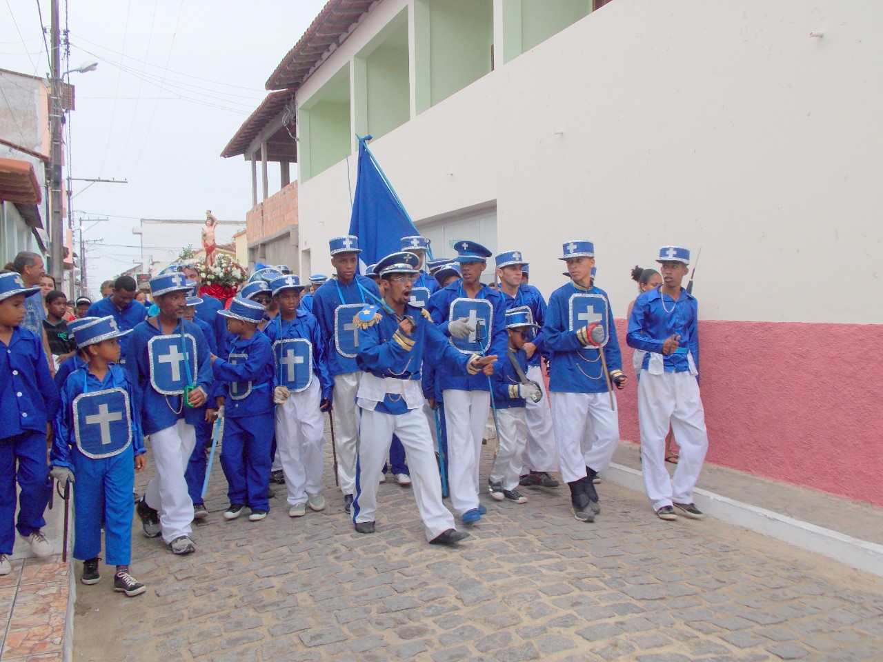 bnnbbh